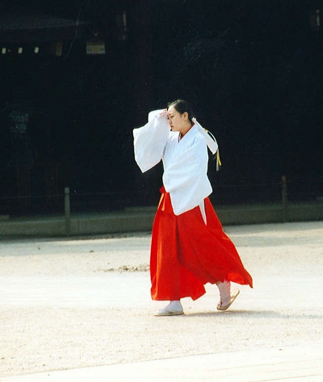 Tokyo, Meiji-jingu, Shinto servant